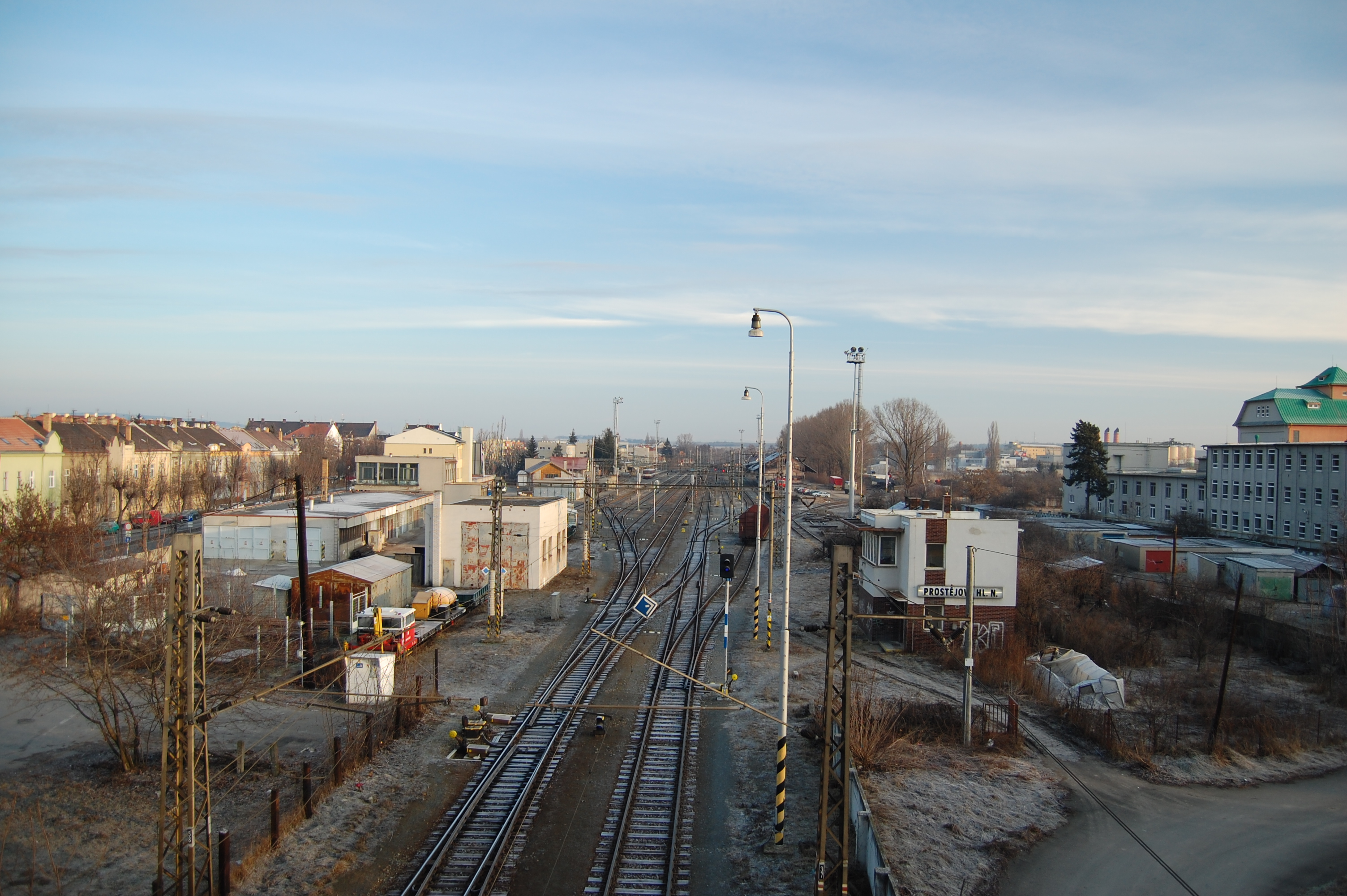 Vjezd na hlavní nádraží - pohled od jihu, Prostějov